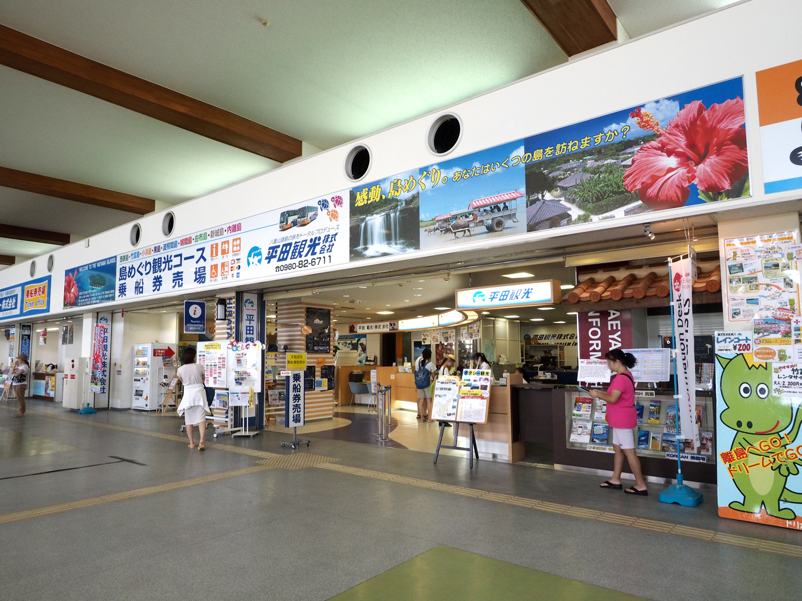 平田観光事務所（沖縄県石垣市・石垣港離島ターミナル）